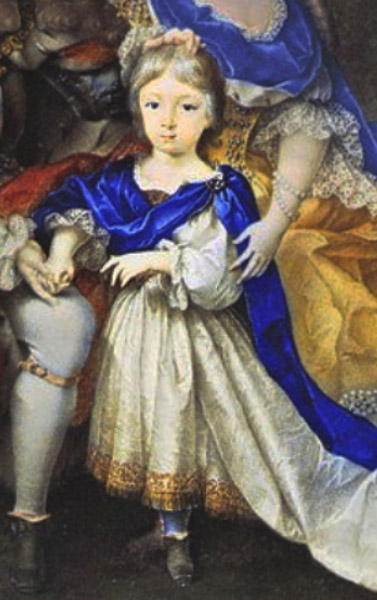 Detalle de un cuadro mayor en el que se puede apreciar el retrato del Príncipe Electoral José Fernando de Baviera, heredero de los reinos hispánicos.